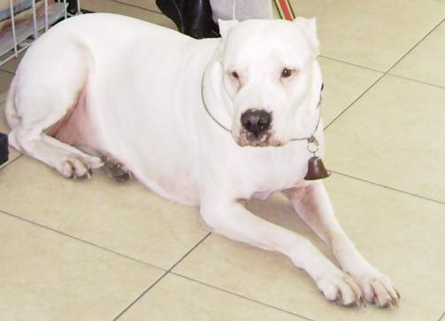 Dogo Argentino hembra. En Mar del Plata, ARGENTINA